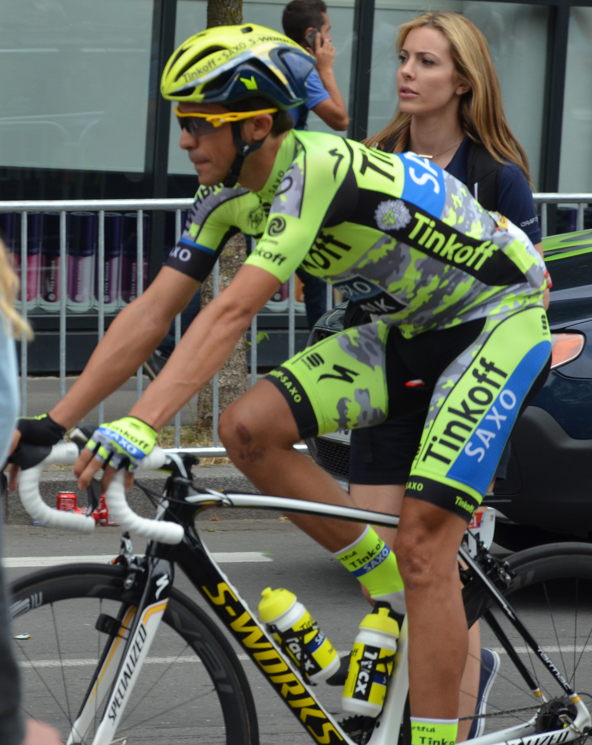 Alberto Contador au départ de la 8ème étape du Tour de France 2015, à Rennes.